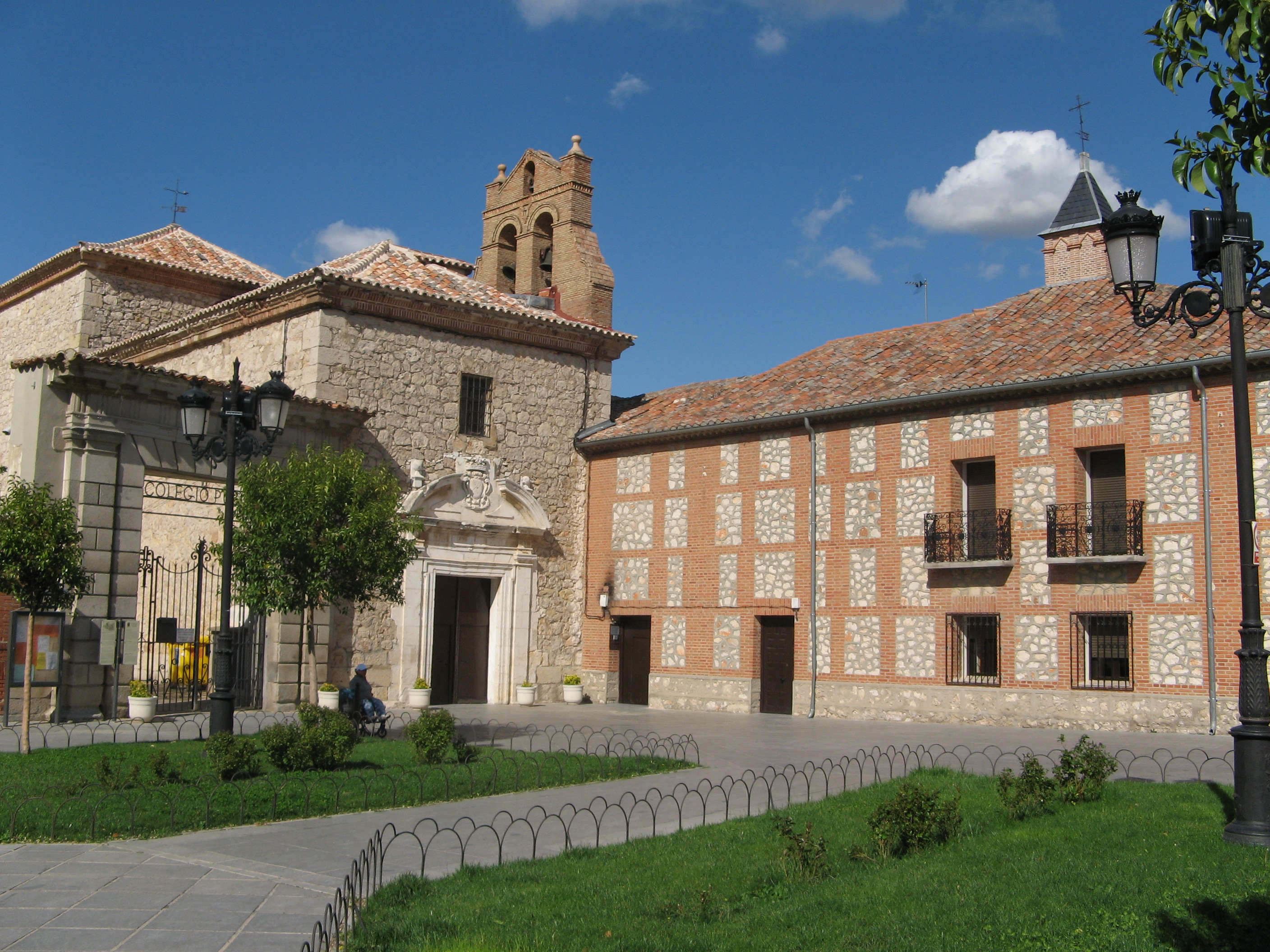 Convento Loeches Comunidad de Madrid España